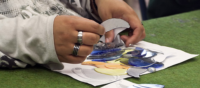 Kunstglaserei